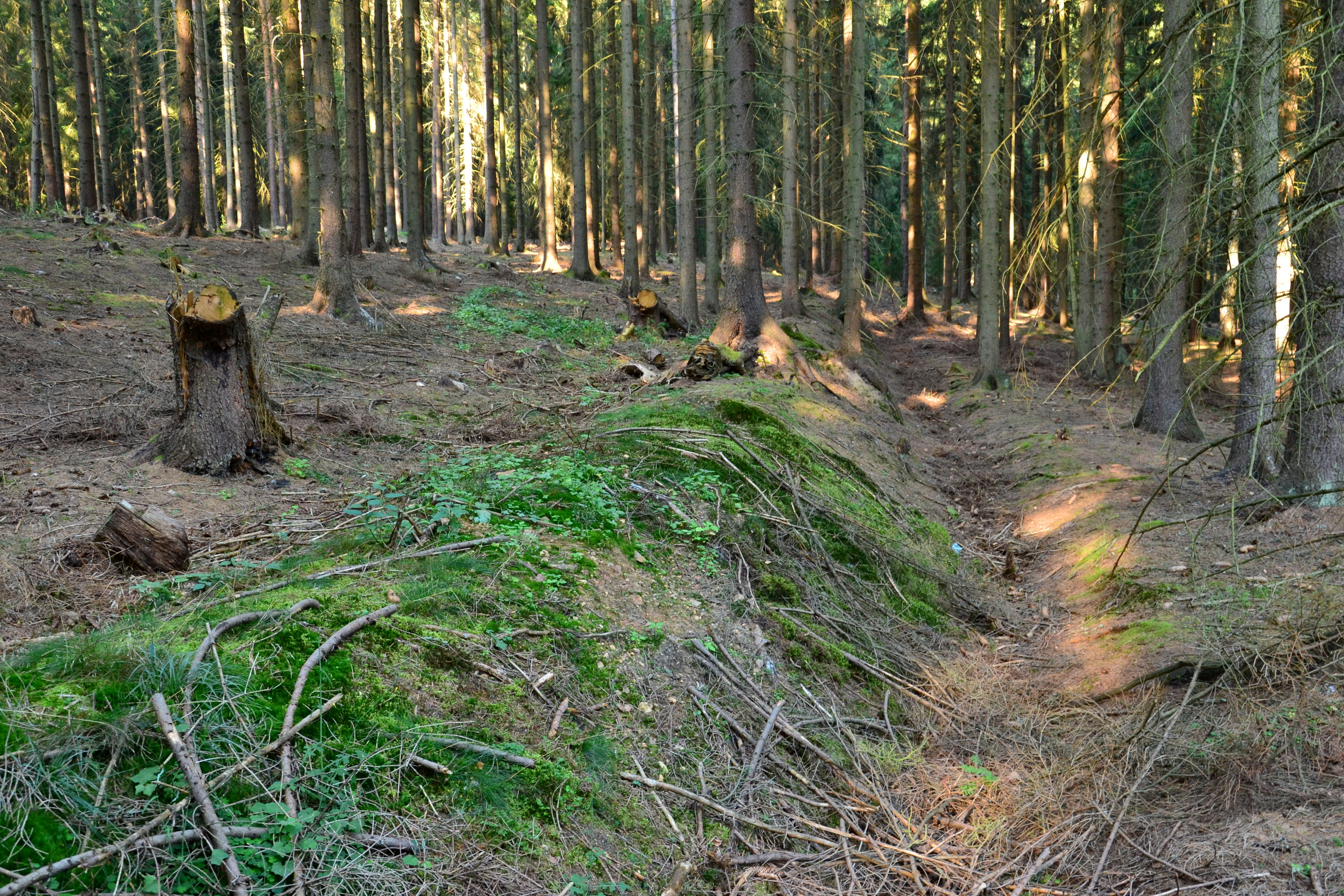 Zaniklá ves Rovný – novověký příkop a val odděloval les a louku